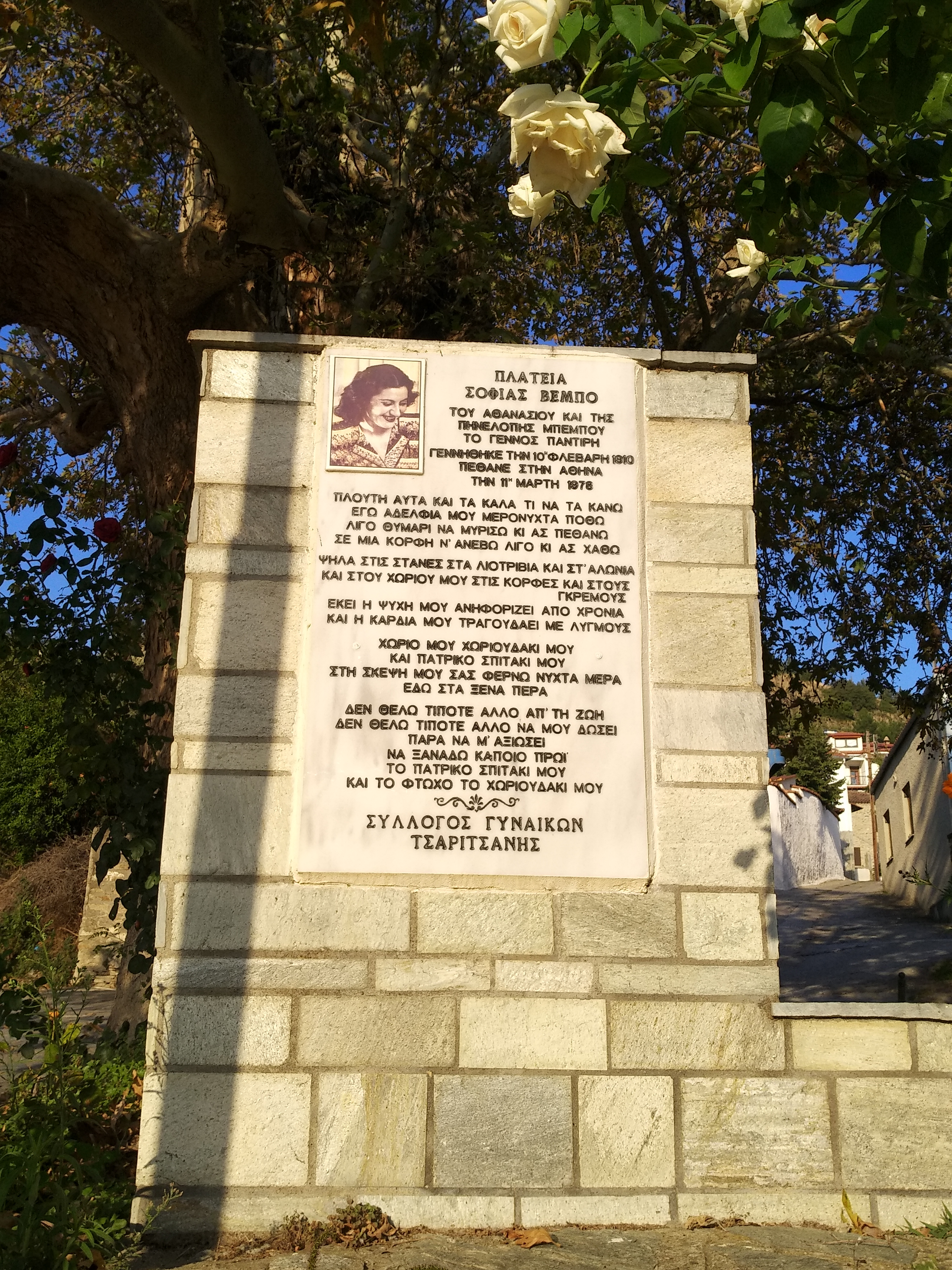 Τσαριτσάνη - πλατεία Σοφίας Βέμπο